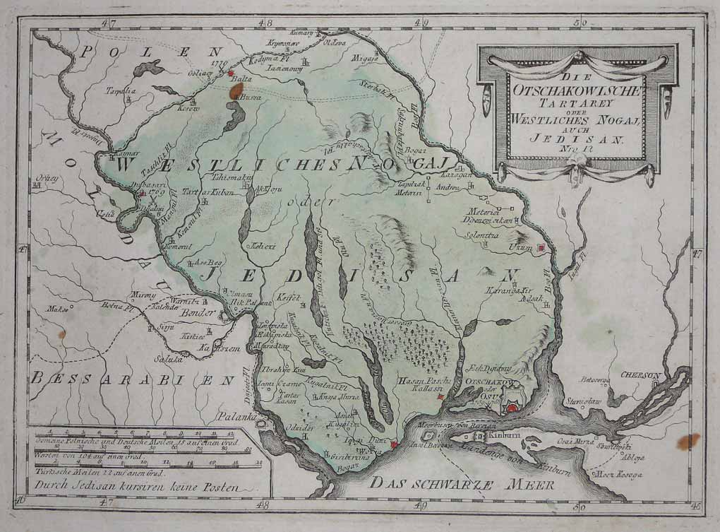 Die Otschakowiwsche Tartarey oder Westliches Nogaj, auch Jedisan.